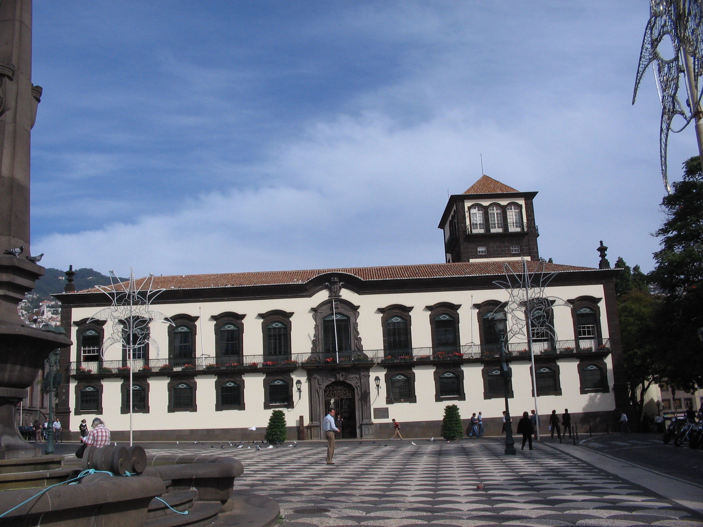 Funchali városháza.